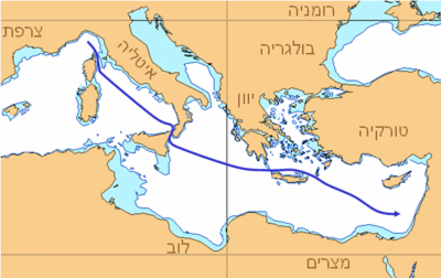 מסלול הההפלגה של אוניית המעפילים אליהו גולומב